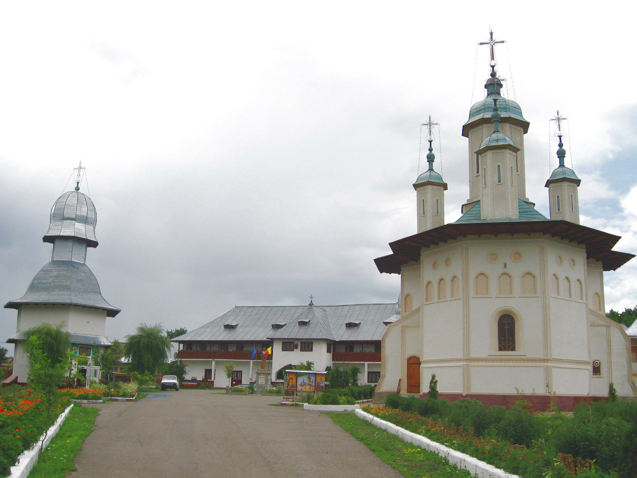 Mănăstirea Bogdăneşti